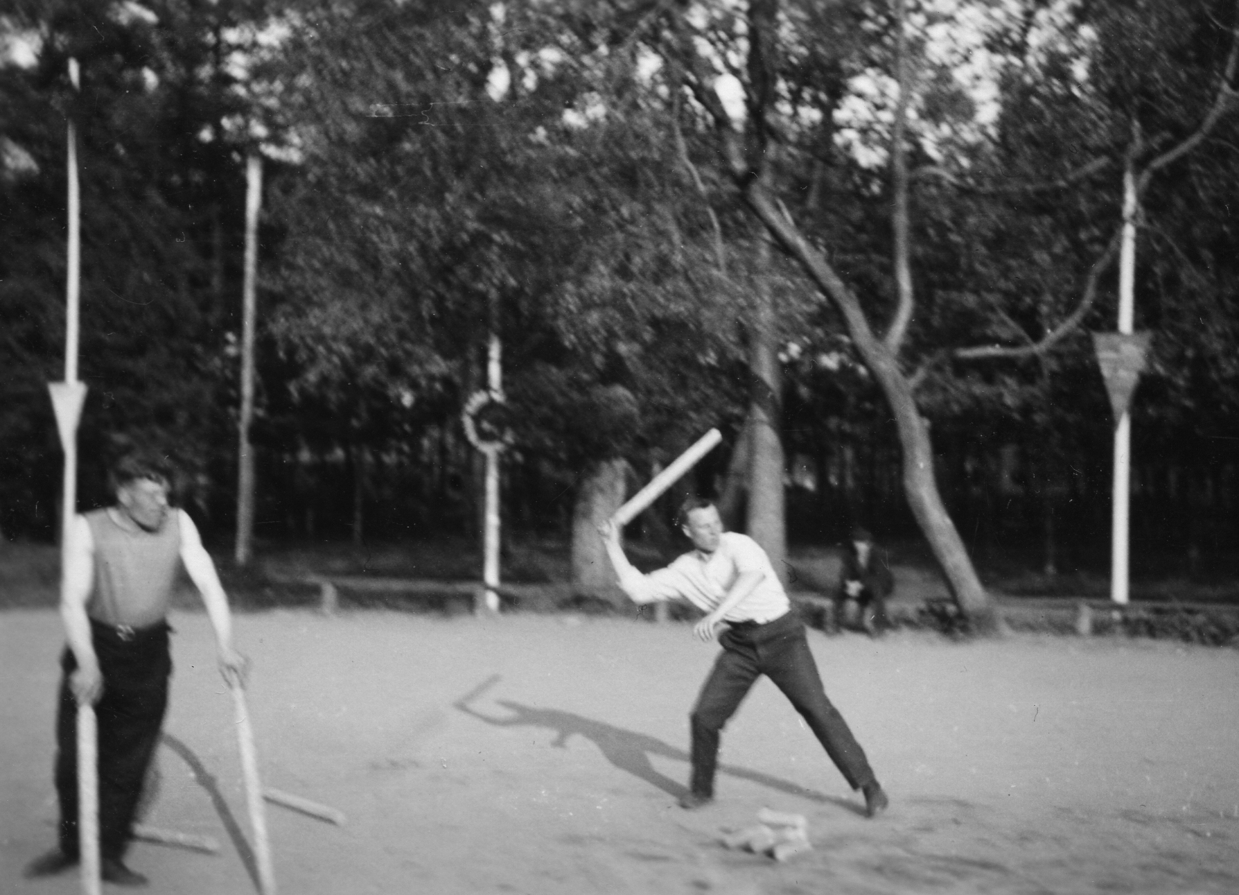 Format: Fotopositiv Dato / Date: 1935 Fotograf / Photographer: Eirik Sundvor (1902 - 1992) Sted / Place: Sovjetunionen - Moskva? Wikipedia: Gorodki Eier / Owner Institution: Trondheim byarkiv, The Municipal Archives of Trondheim Arkivreferanse / Archive reference: Tor.H46.B08.F22668 Merknad: Bildet viser to menn engasjert i den russiske folkeidretten Gorodki. Fra en reise til Sovjetunionen foretatt av Eirik Sundvor 1935. Eirik Sundvor (1902 - 1992) var journalist i Avisa Nidaros 1924 - 1940 og 1945 - ca. 1957. Sundvor flyktet til England med sin kone under krigen. Der var han redaksjonssekretær i Norsk Tidend i London. Sundvor hadde god kjennskap til russisk, og ble derfor sendt som major med oberst Arne Dahls ekspedisjon til Finnmark i 1944 / 1945. Sundvor stod for utgivelsen av den første frie norske avis i Finnmark i 1945. Etter at Avisa Nidaros gikk inn som dagsavis flyttet han tilbake til Bergen, hvor han opprinnelig kom fra. Her virket han som korrespondent for Dagbladet i Vest-Norge.